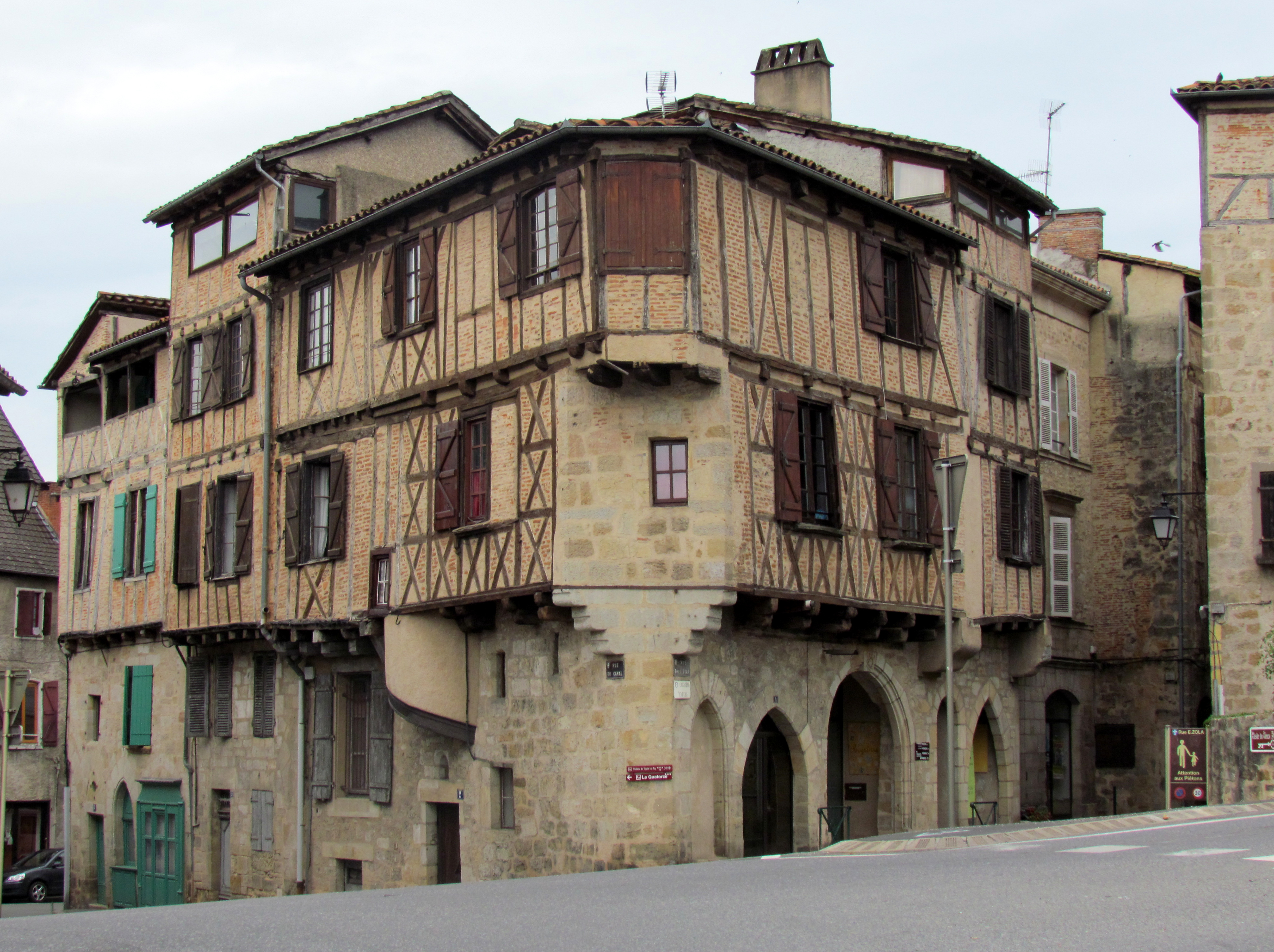 Vieilles maisons de Figeac (Lot) .